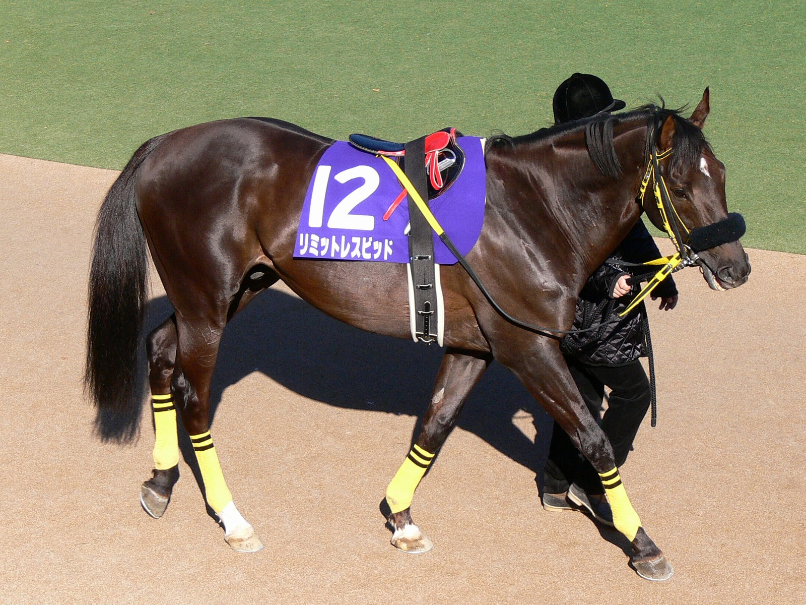 Limitless-Bid リミットレスビッド at "February stakes(GI).